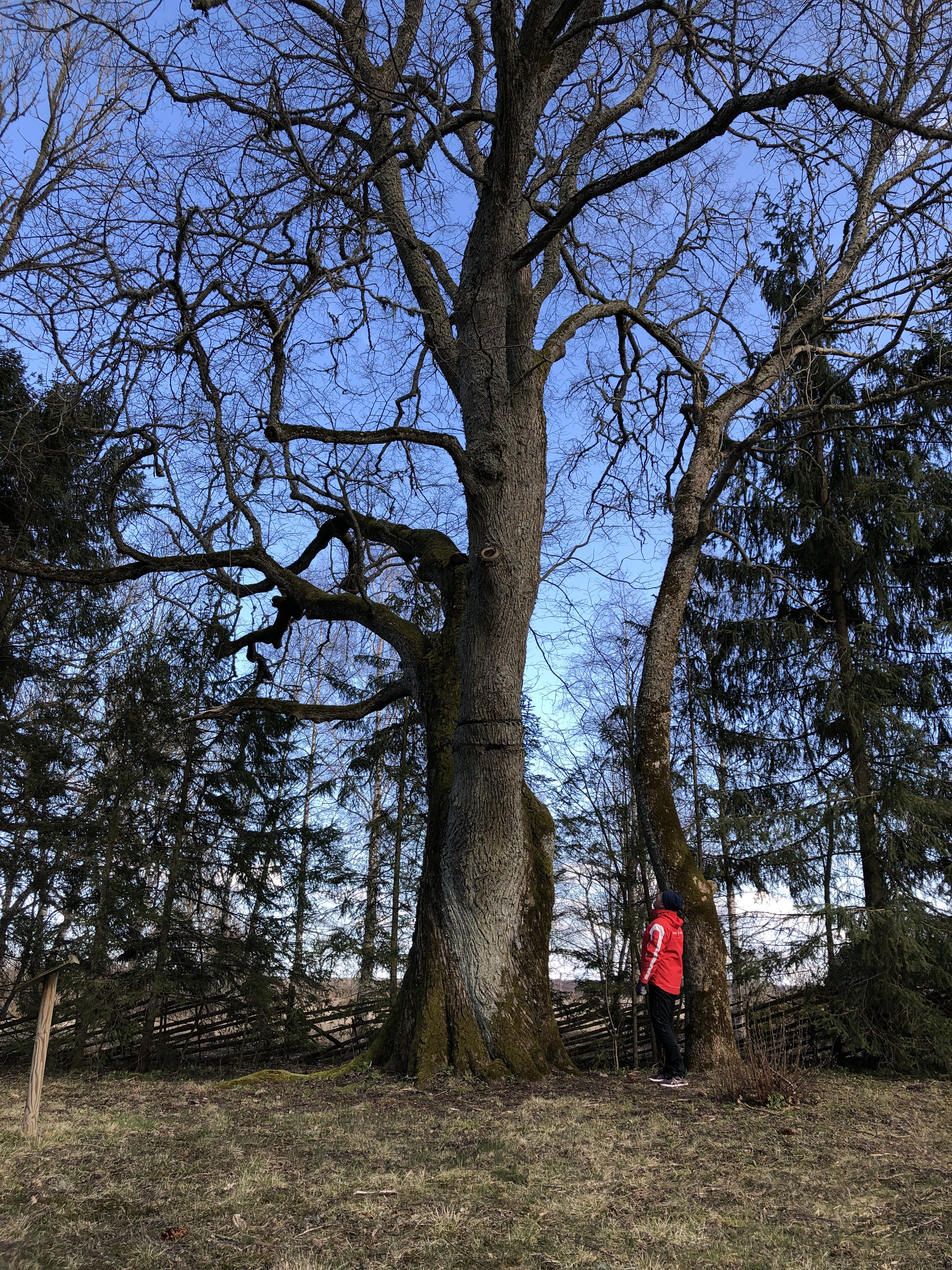 Niinepuu